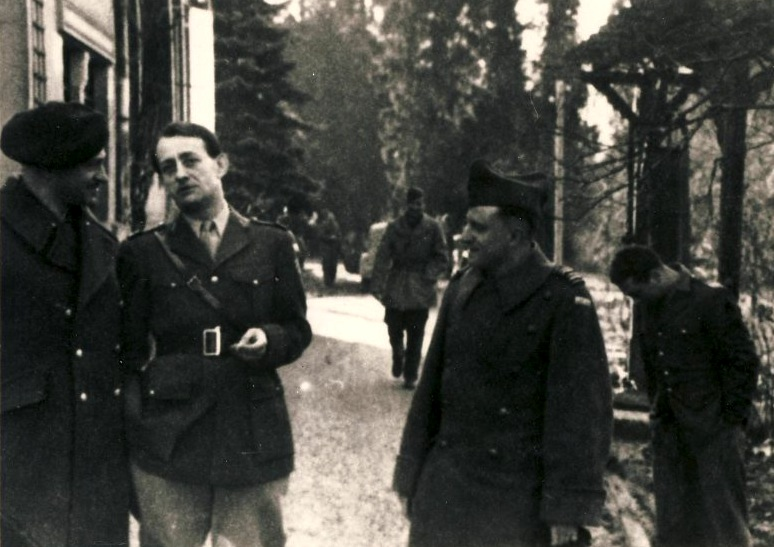 Photo prise sur le front d'Alsace en 1944 avec le Colonel Berger (A. Malraux)